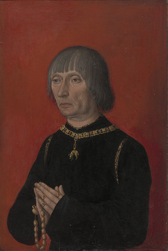 Portret van Lodewijk van Gruuthuse (Meester van de Vorstenportretten, circa 1472 - circa 1482); collection: Musea Brugge - Groeningemuseum